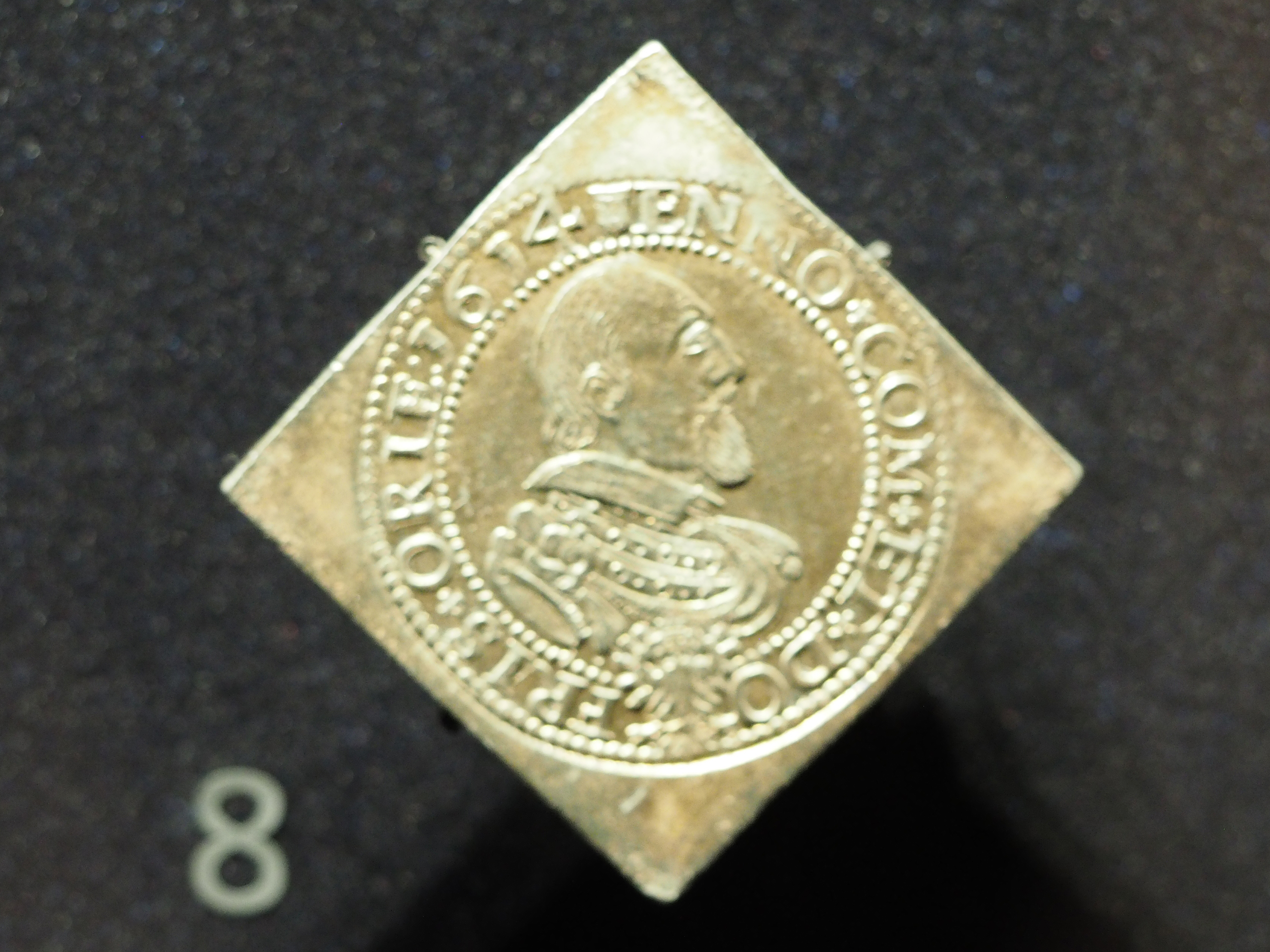 Silber, 58.98 g